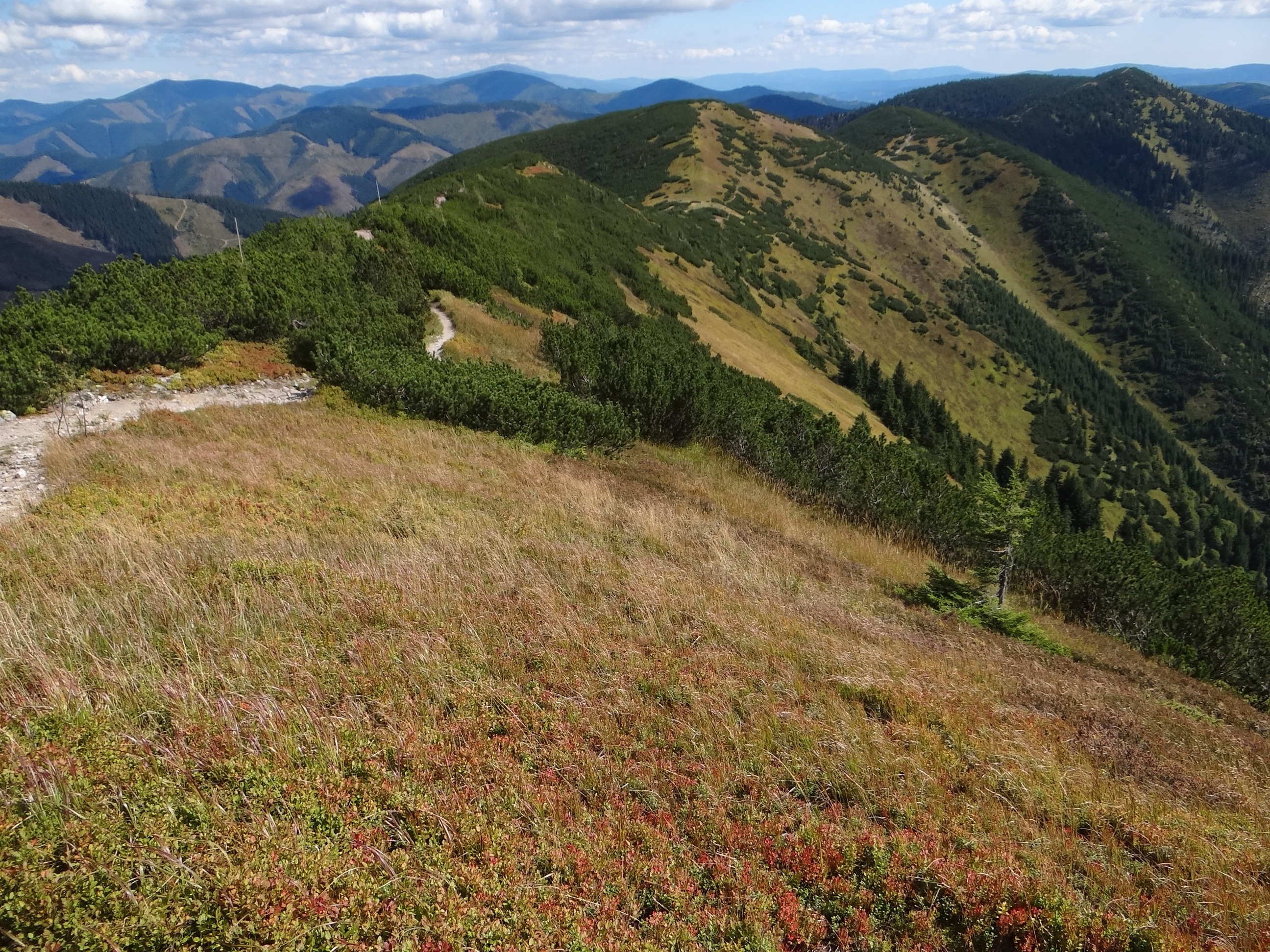 Grzbiet między Rovienkami i Kraličką z przełęczą Kumštové sedlo